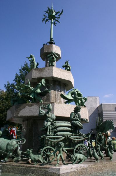 Bild vom Egerlandbrunnen am Tag der Einweihung (3. September 2005) Foto: Erich Wetzka, Bund der Eghalanda Gmoin e.V.